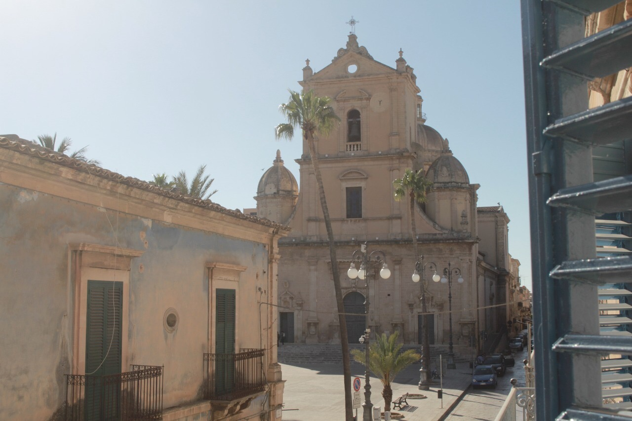 Veduta della chiesa di S. Giovanni Battista e di P.zza Ricca